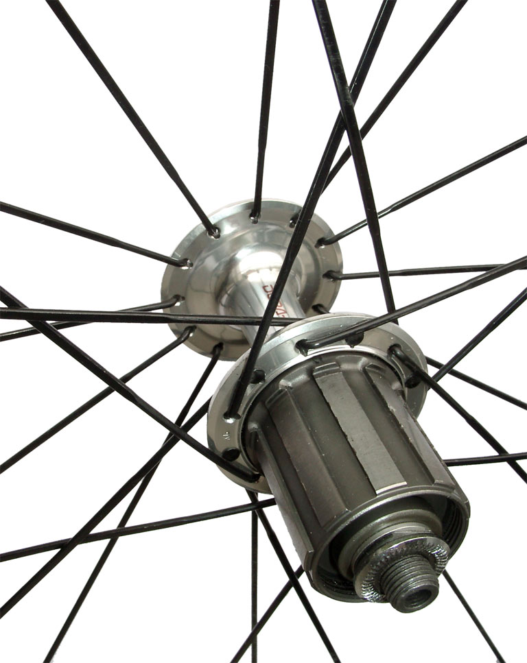 Motiv: Nabe, Modell „DURA-ACE“ der Firma Shimano. Diese spezielle Version verfügt über lediglich 24 Speichenlöcher. Antriebsseitig sind die Speichen 3-fach gekreuzt, auf der Gegenseite verlaufen die Speichen radial. Bei den Speichen handelt es sich um Messerspeichen. Fotograf: KMJ Aufnahmedatum: 2004-06-26 Aufnahmeort: Studio Bildname: Nabe_01_KMJ.jpg Bildgröße: 768 Pixel × 967 Pixel (101.153 Bytes) Stichworte: Nabe, Hinterrad, Speiche, Messerspeiche, Aerospeiche, Freilauf, Freilaufkörper, Fahrradtechnik